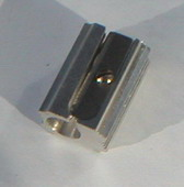 Taille-crayon moderne - Objet personnel - Photo prise par moi même - LessayCatus 19:50, 3 December 2006 (UTC)